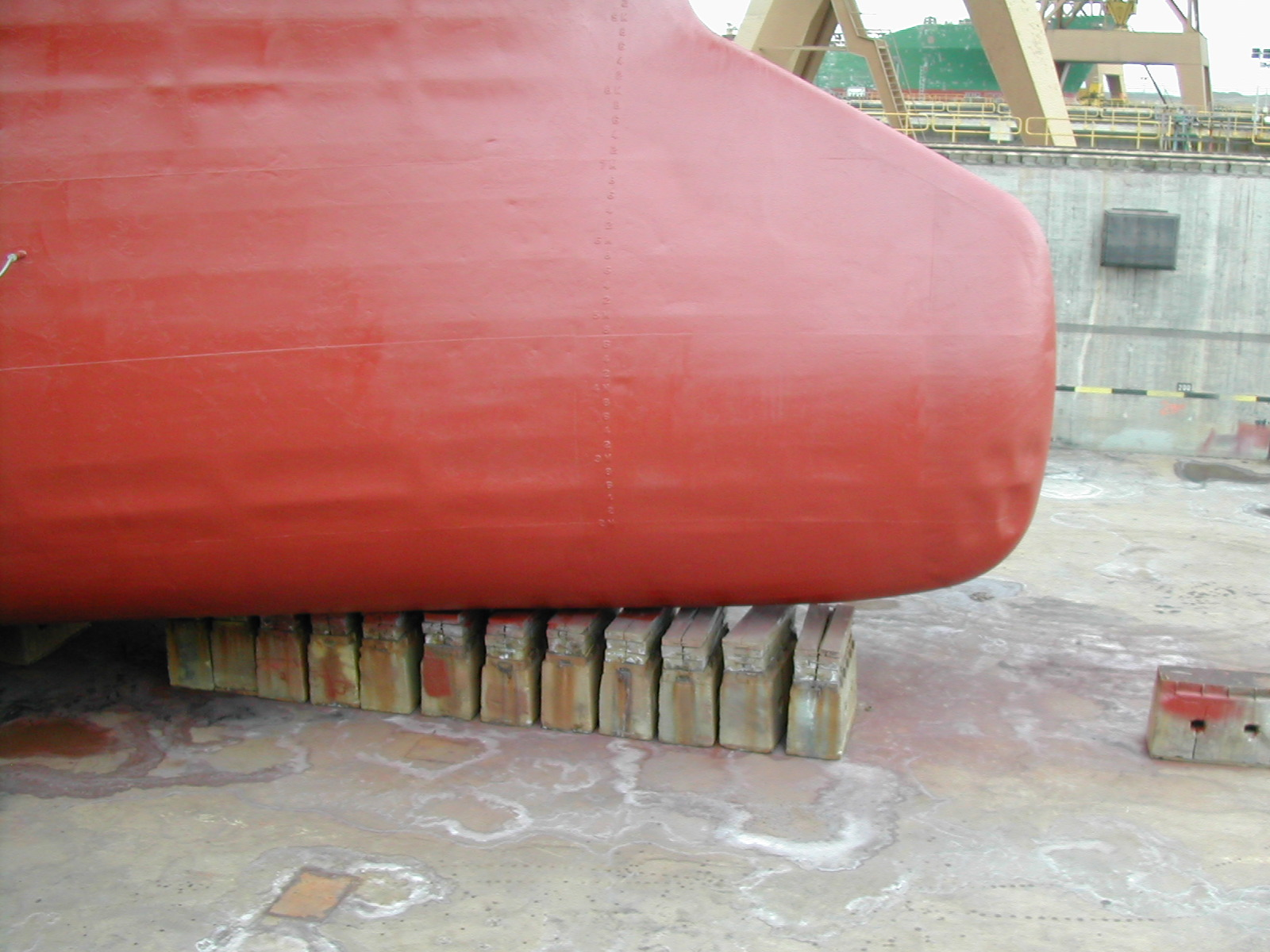 Picadeiros em doca seca do estaleiro da Lisnave, Portugal